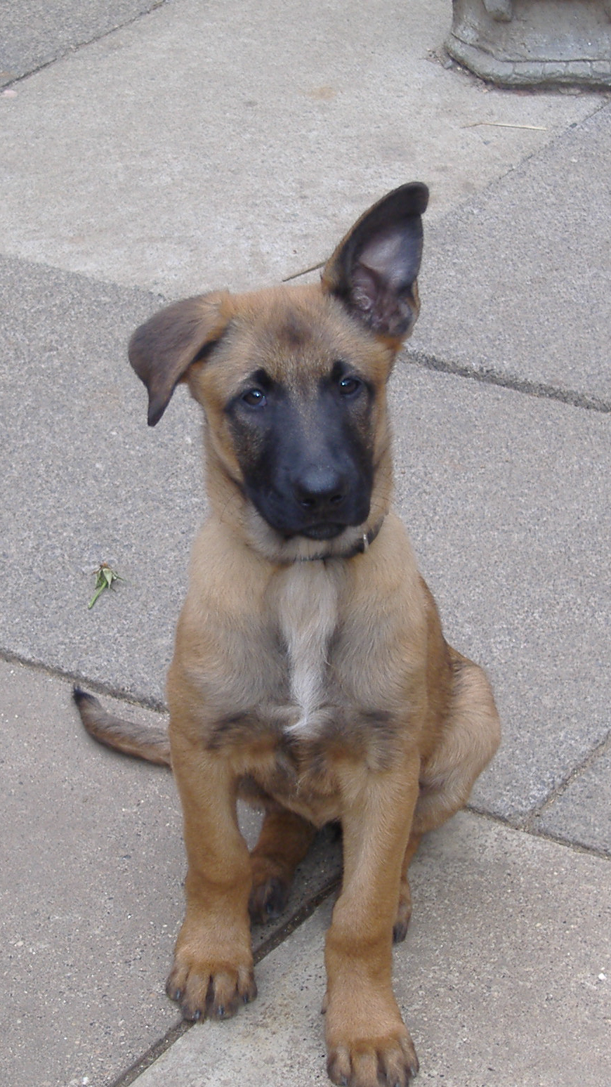 kammla at 3months old